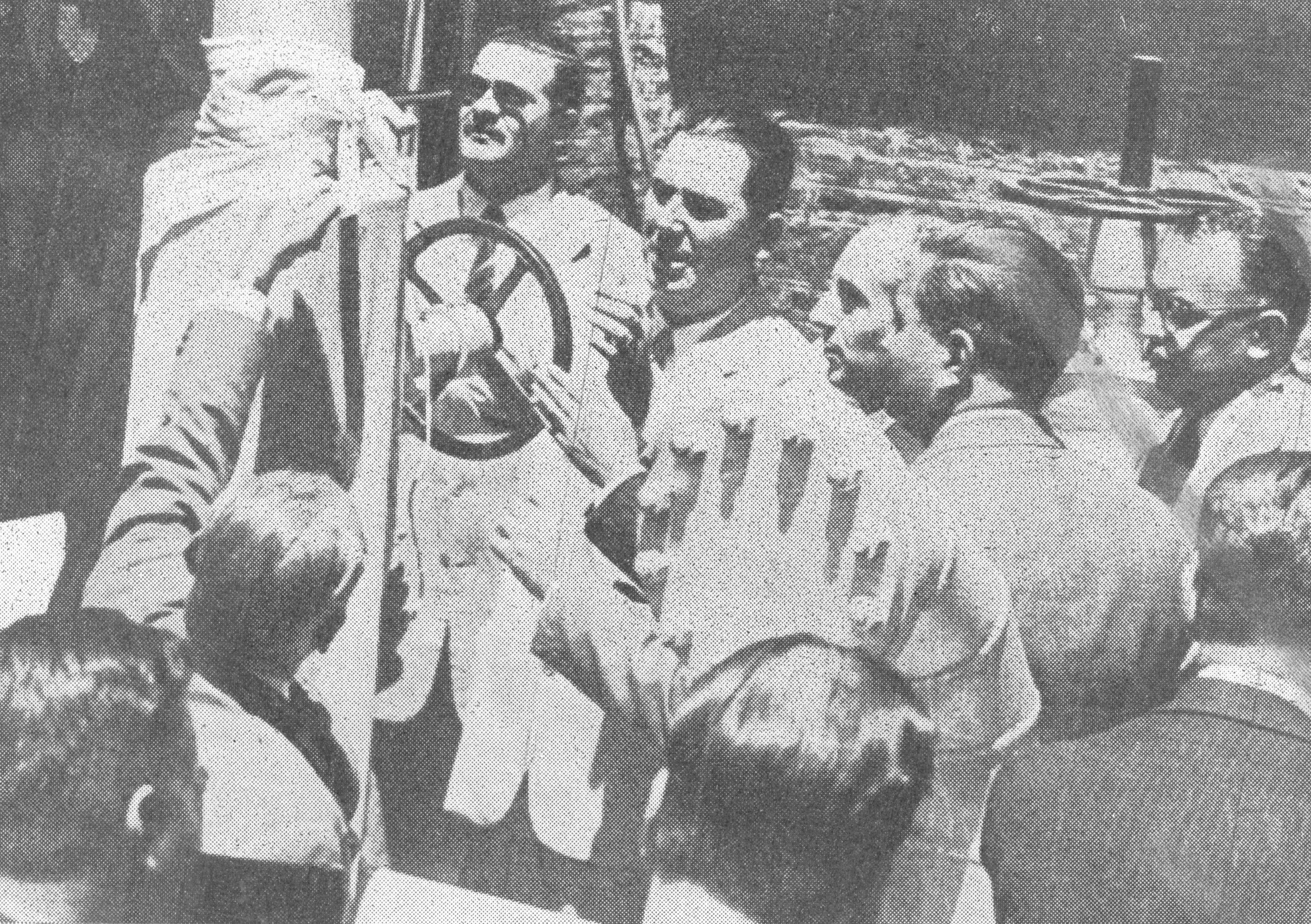 Apertura del gasoducto Presidente Perón.